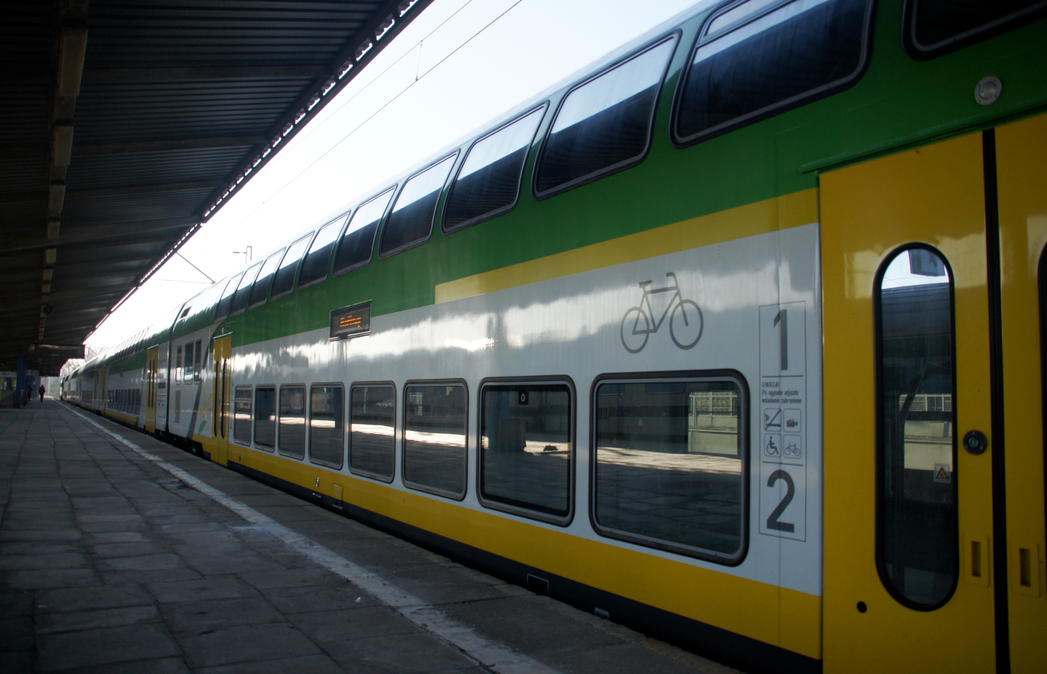 Wagony piętrowe push-pull produkcji "Bombardier" na stacji Warszawa Wschodnia